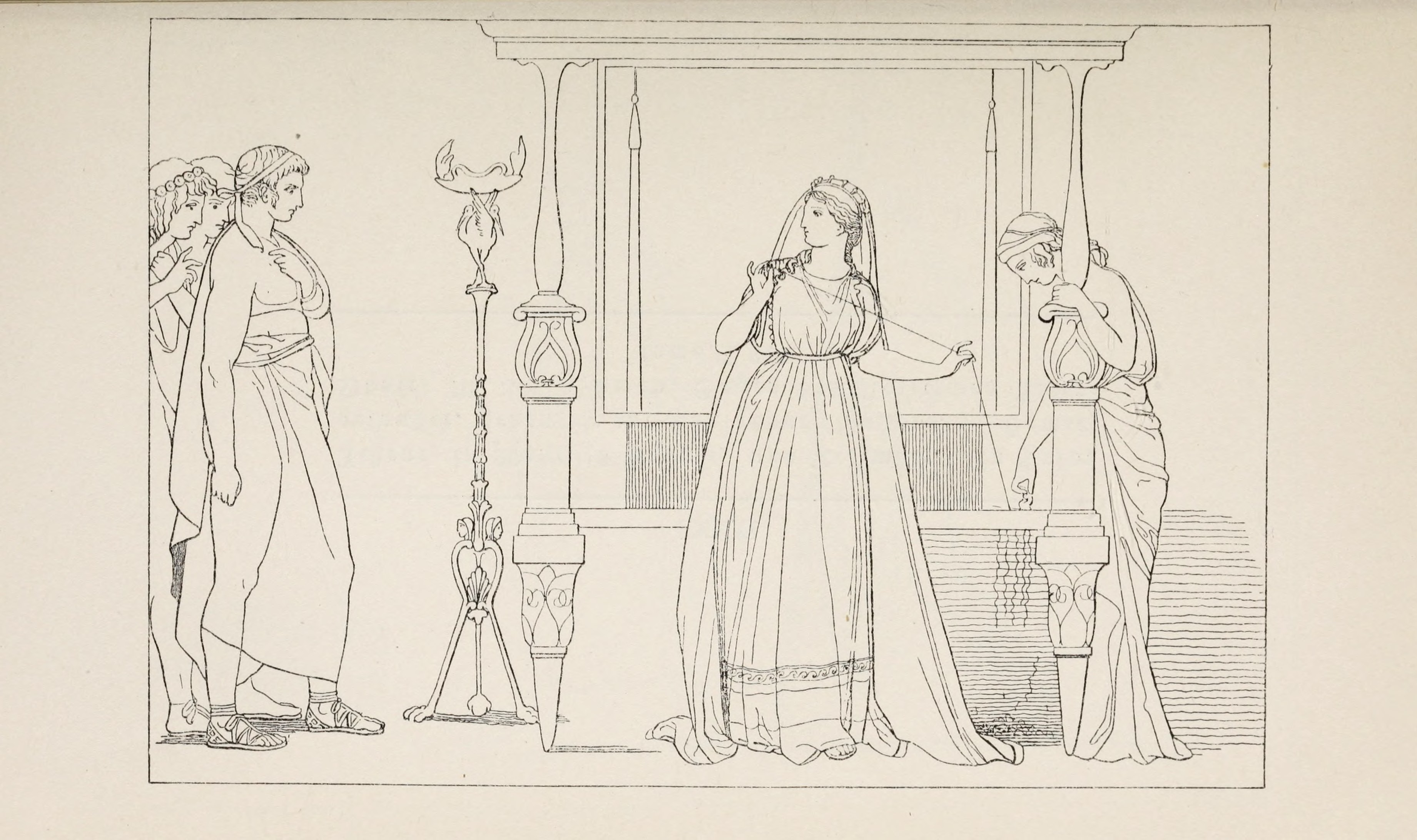 Die Freier überraschen Penelope, wie sie nachts auftrennt, was sie am Tage gewoben. – Homer, Odyssee II. 109. Schwab, Sagen des klassischen Altertums II. 213.